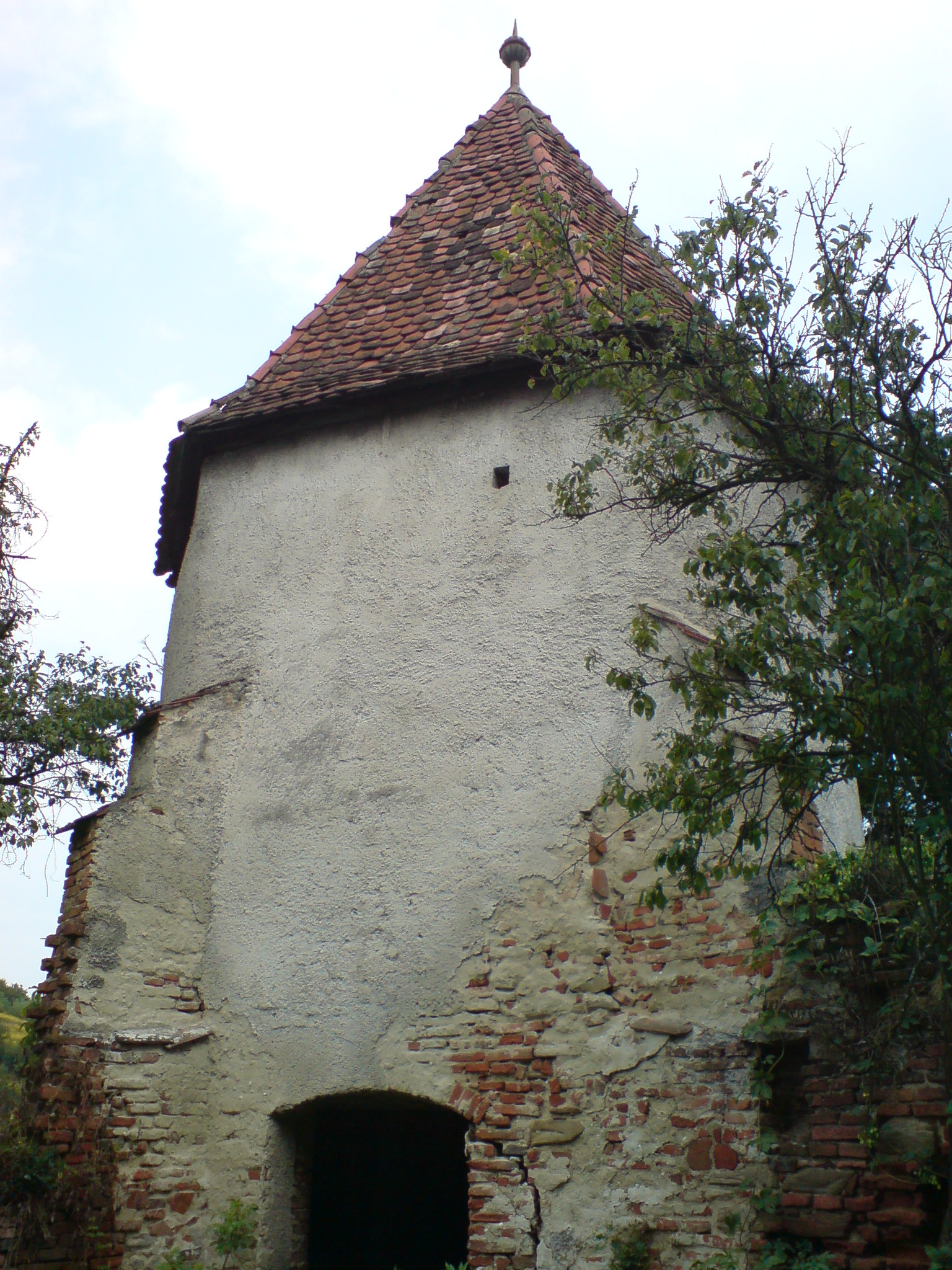 Kirchenburg Mardisch (Moardăş, Sibiu) Nordostturm (2008) 02